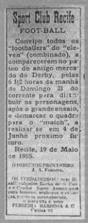 Convite para o primeiro jogo do Sport (1905)